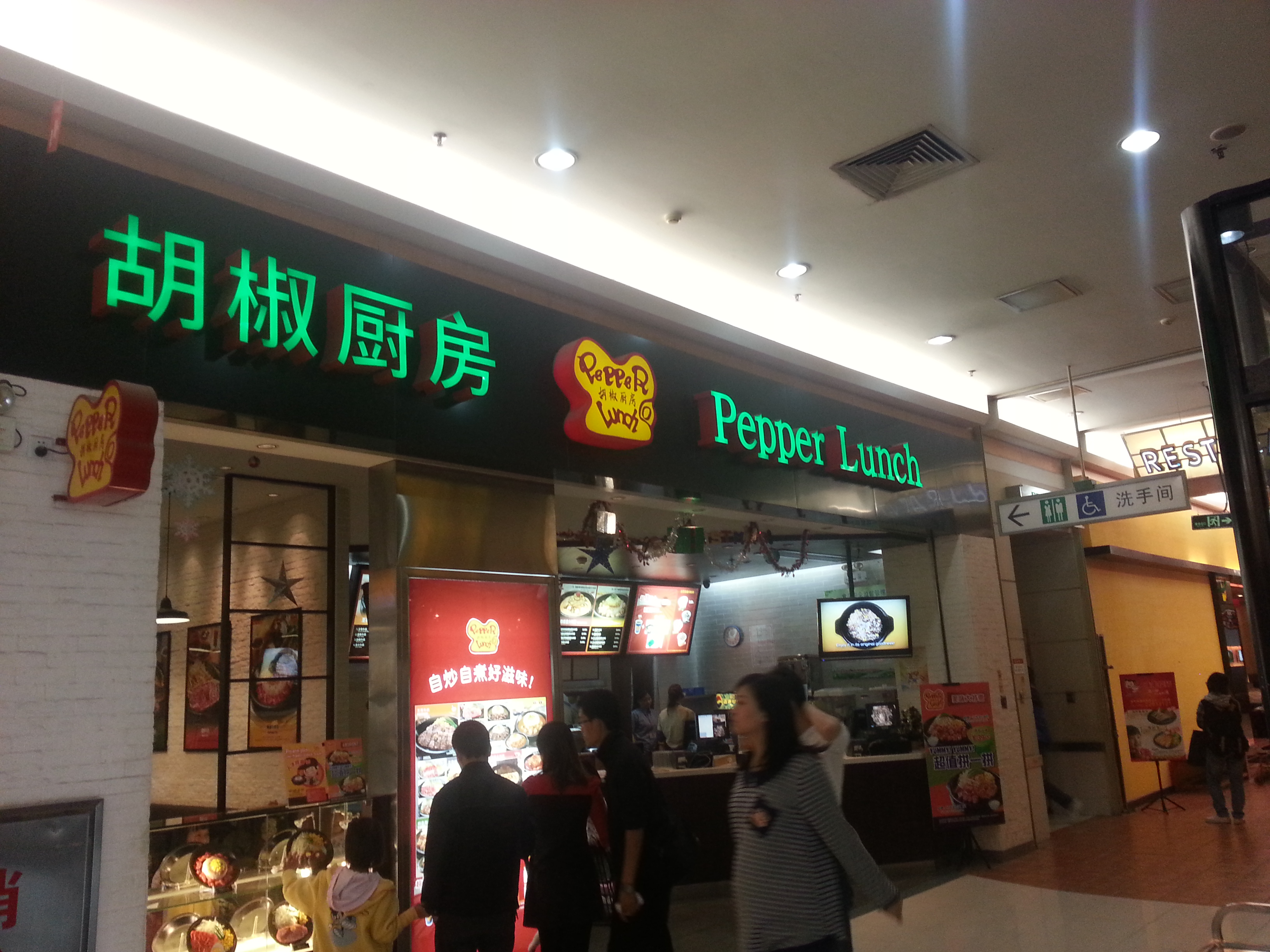 A Pepper Lunch restaurant in Shunde.